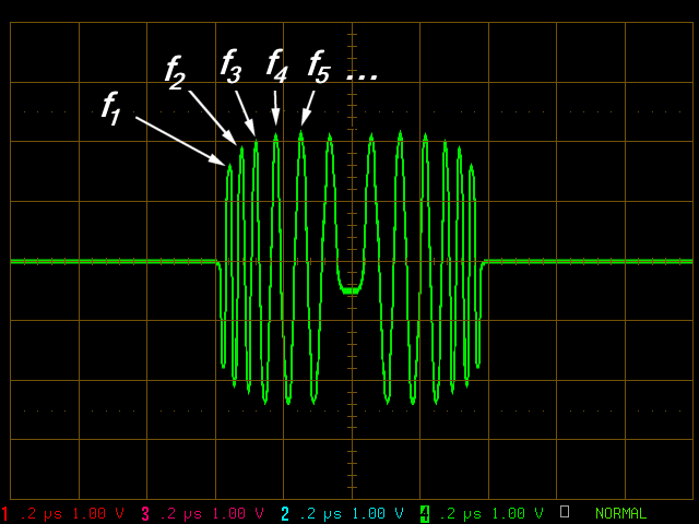 Einzelfrequenzen in einem frequenzmodulierten Sendeimpuls